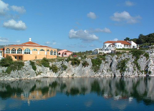 Rogoznica Drachenaugensee